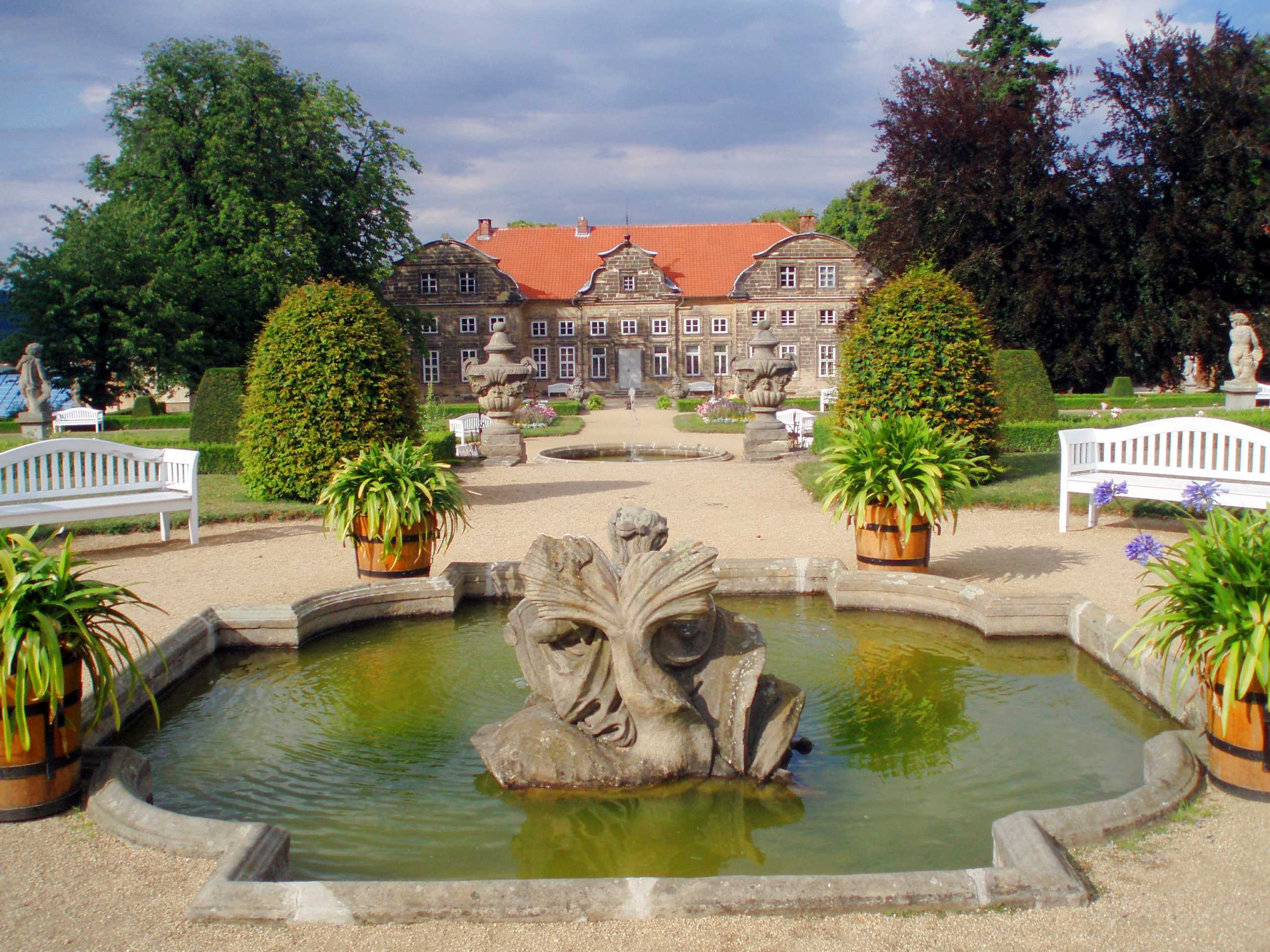 Barockgarten und Kleines Schloss in Blankenburg (Harz)